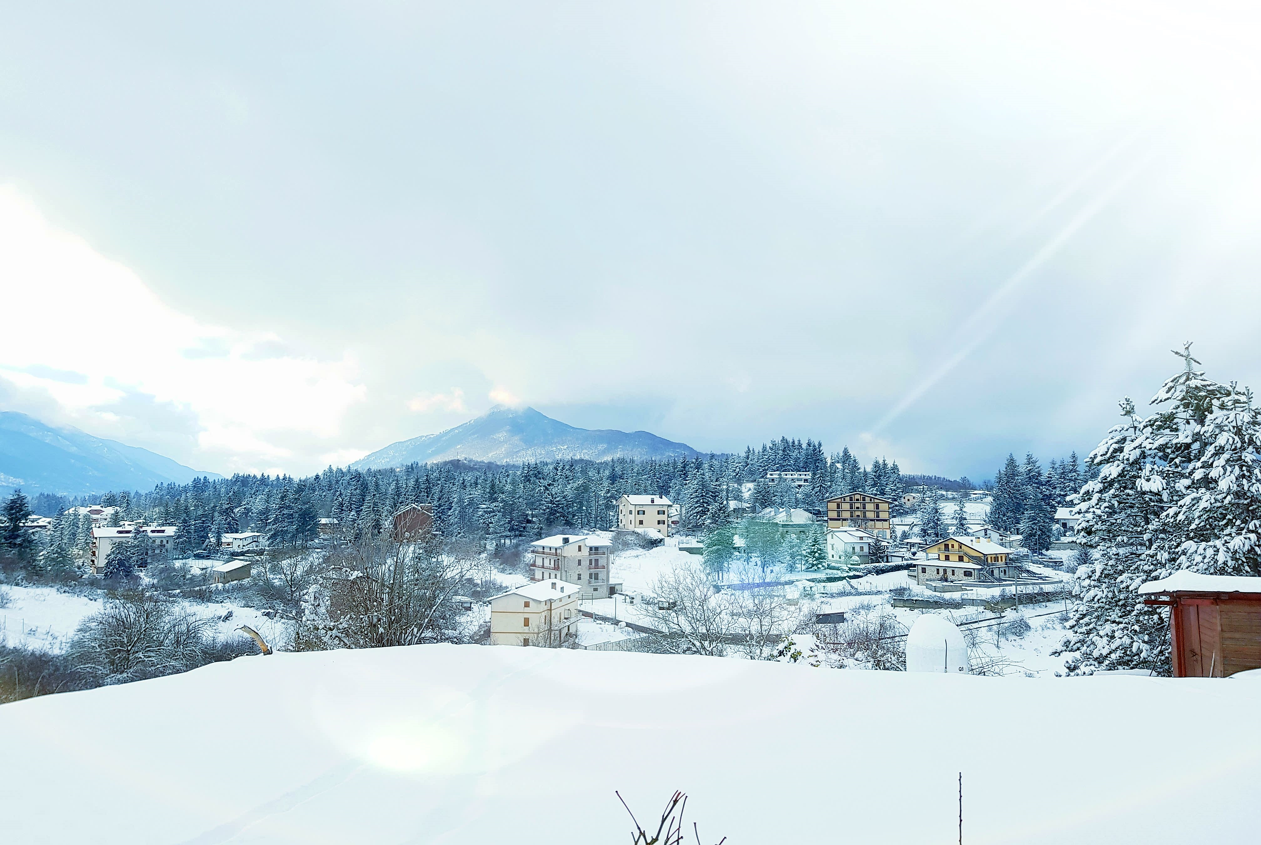 Panorama Altipiani di Arcinazzo innevati